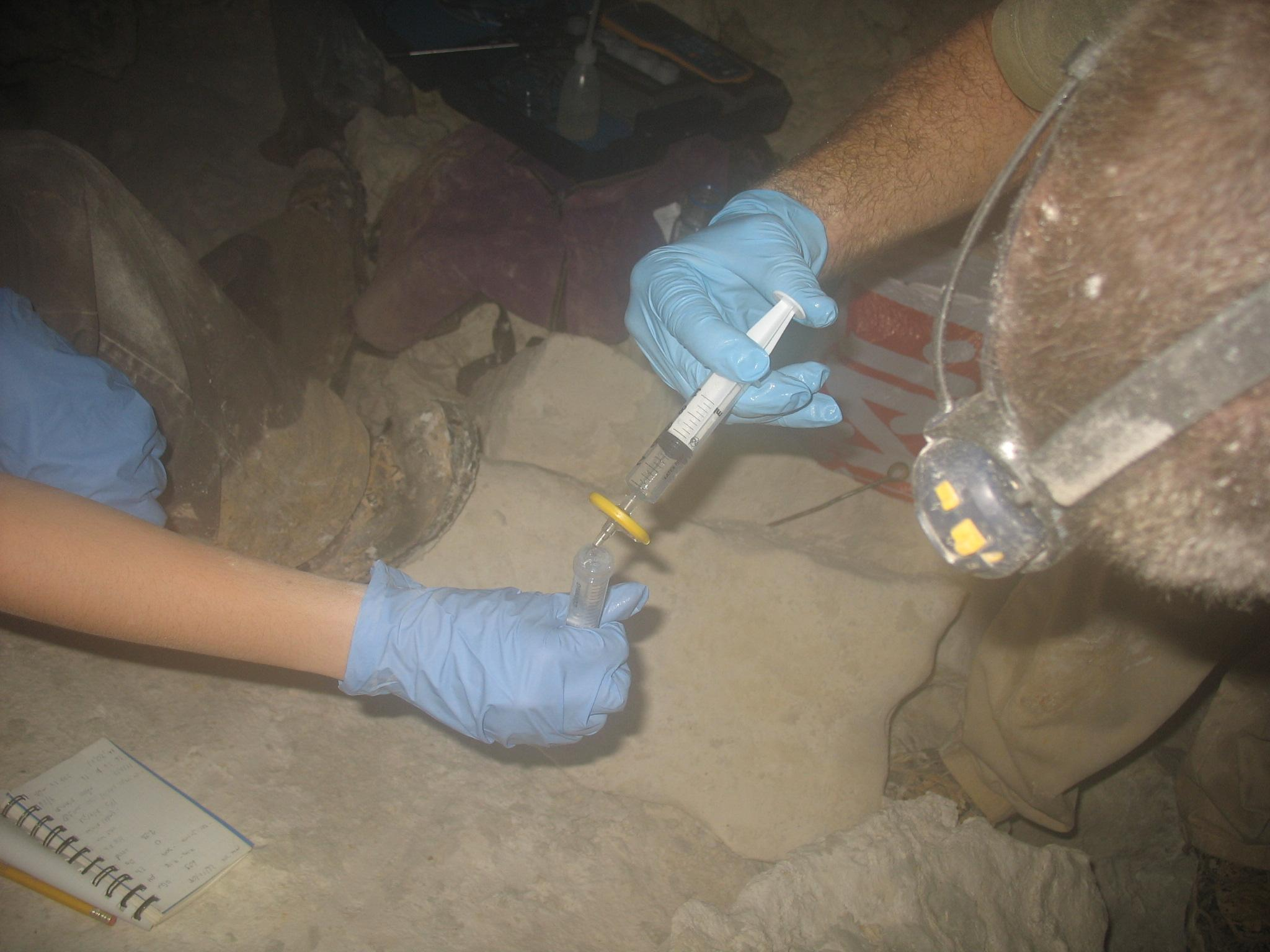 לצורך אנליזה כימית של יסודות קורט